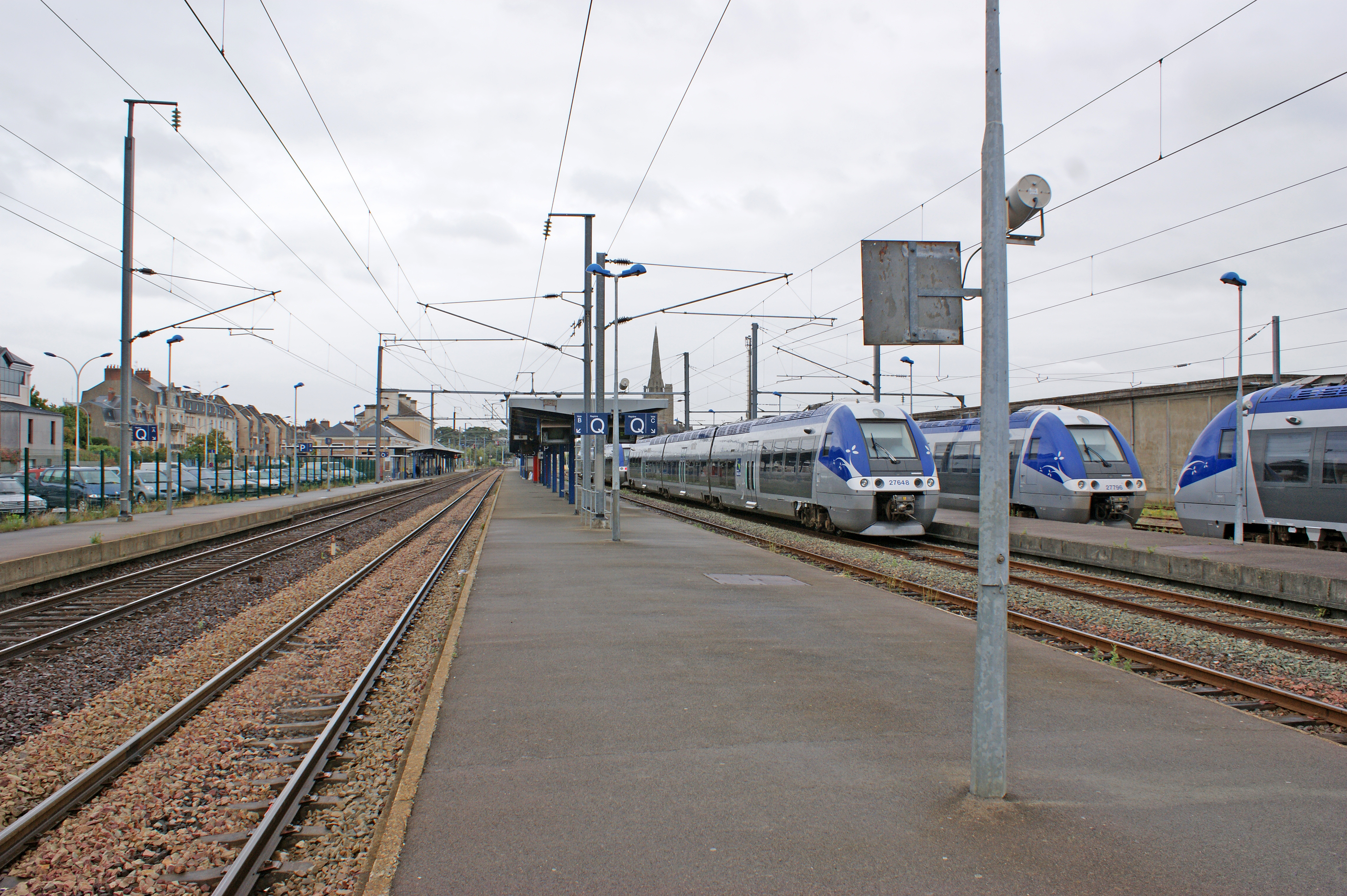 Vue d'ensemble de l'intérieur de la gare de Redon, avec les automotrices électriques Z 27648 et 7 27796 des TER Bretagne.